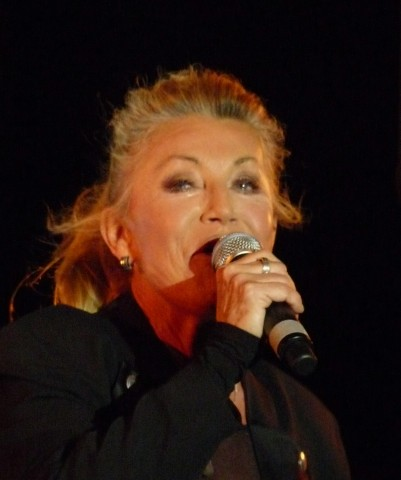 SHEILA FETE DE LA MUSIQUE